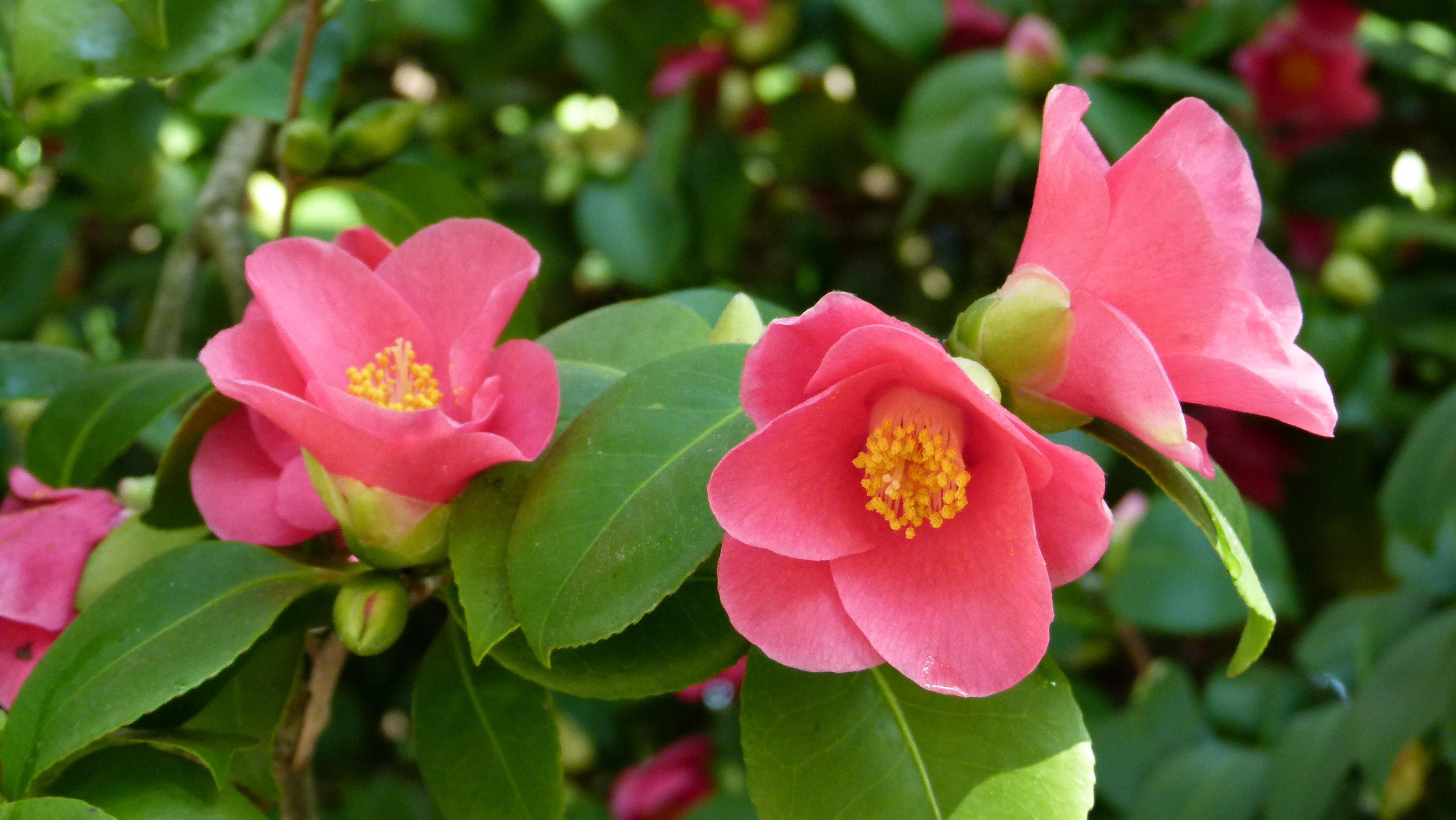 Camellia japonica, Kamelie, Schloss Pillnitz, Dresden